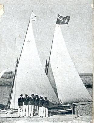 "בת-גלים" וצוותה. סירת "זבולון", חזרה מקפריסין בשנת 1943.